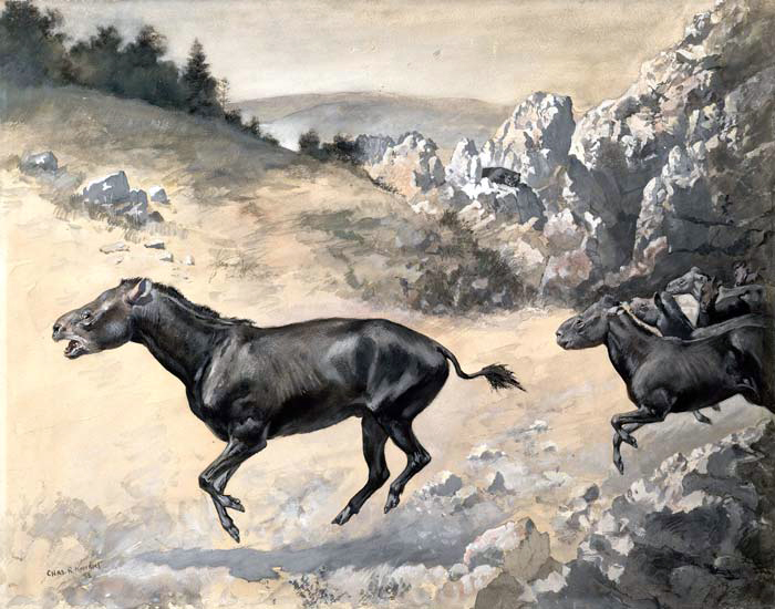 Hyracodon.